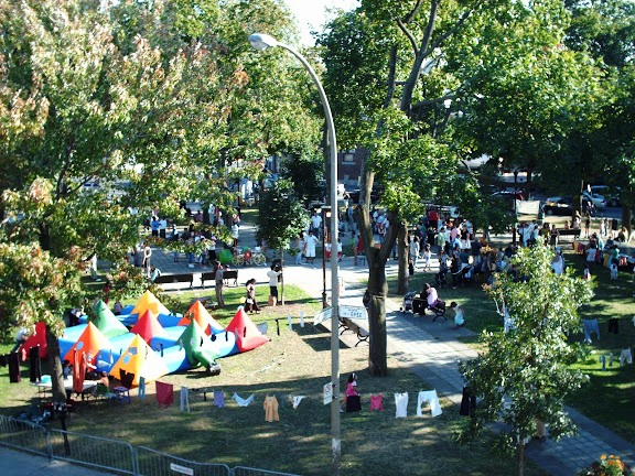 Fête de de quartier à l'occasion du 25ème anniversaire de la Coopérative Nos Rêves, en 2007.